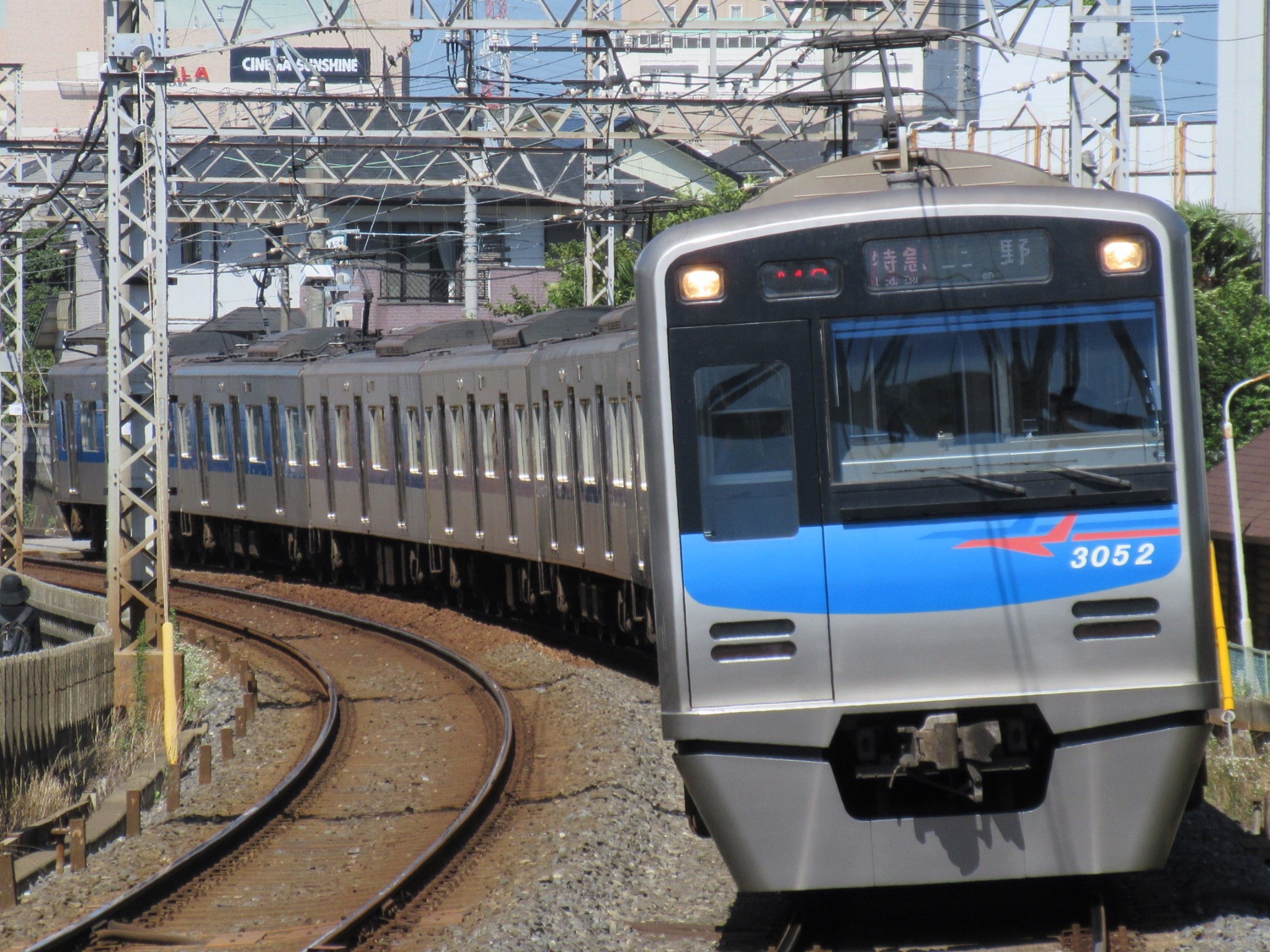 京成3000形3052F 京成本線志津駅